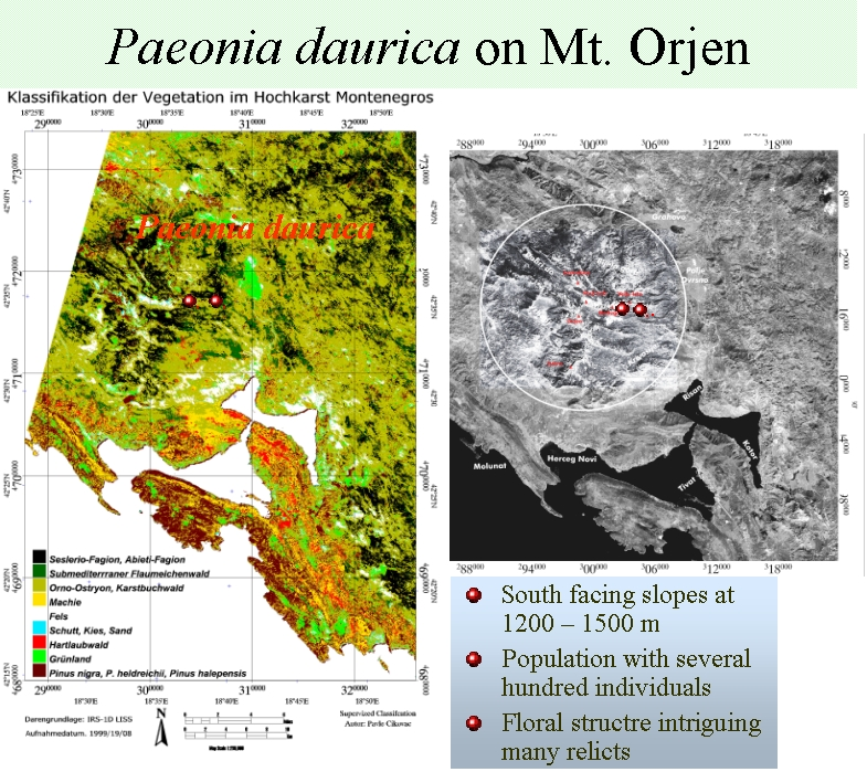 Verbreitung von Paeonia daurica im Orjen